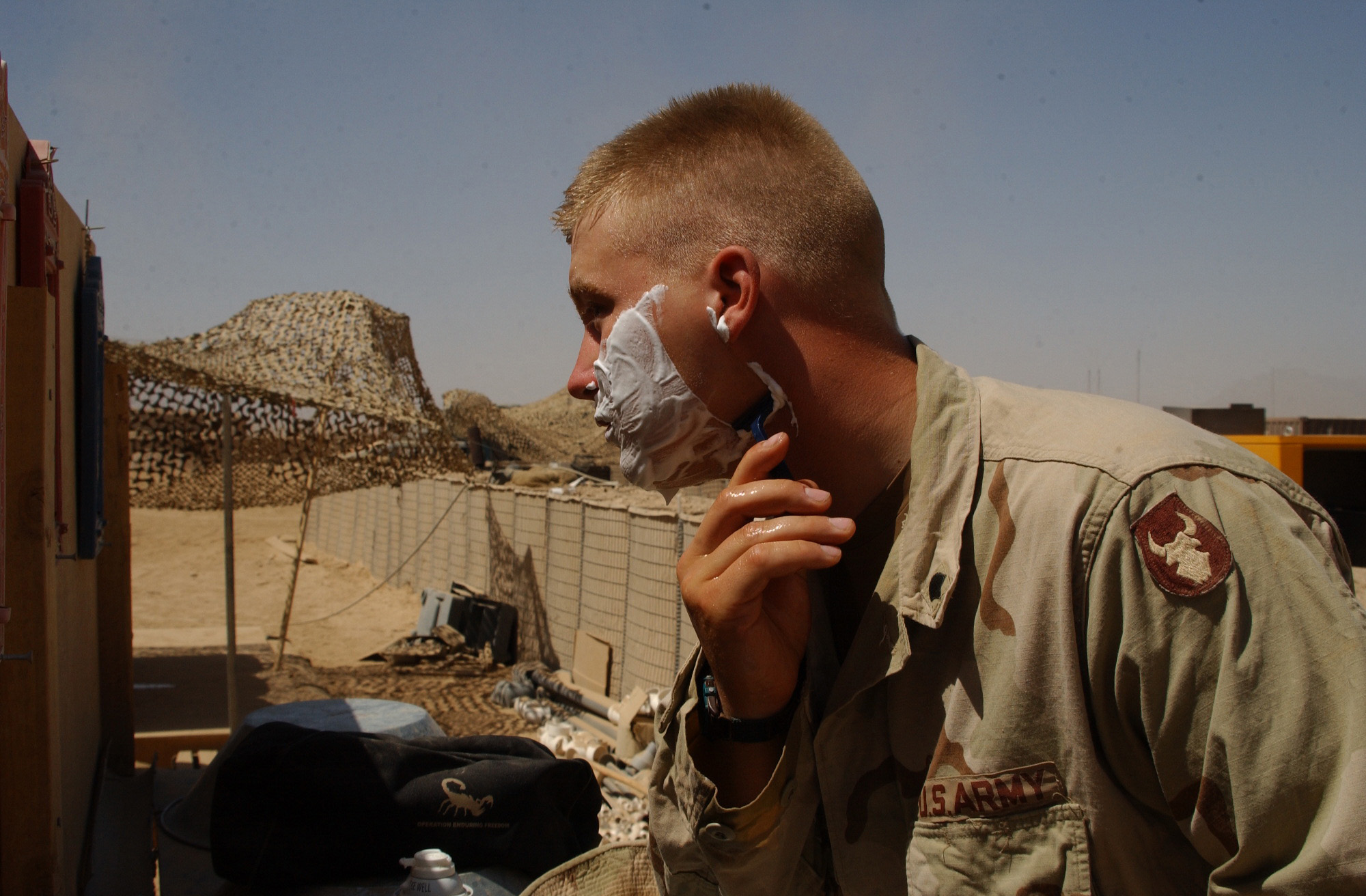 Nassrasur